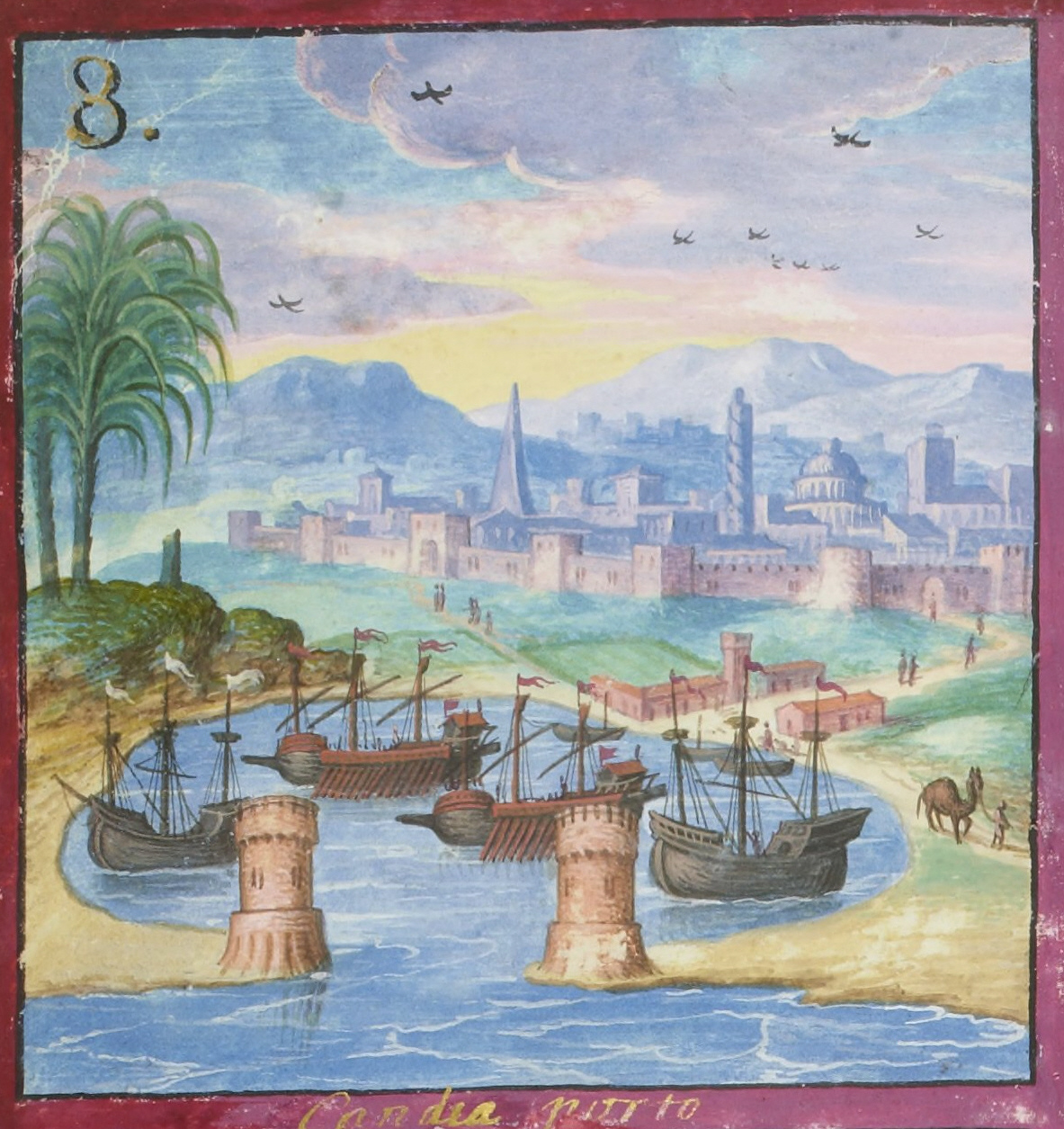 Voyages et aventures de Ch. Magius, Bibliothèque nationale de France, département Estampes et photographie, RESERVE 4-AD-134, detail de la miniature no. 8; entrée de Magius dans le port d'Alexandrie